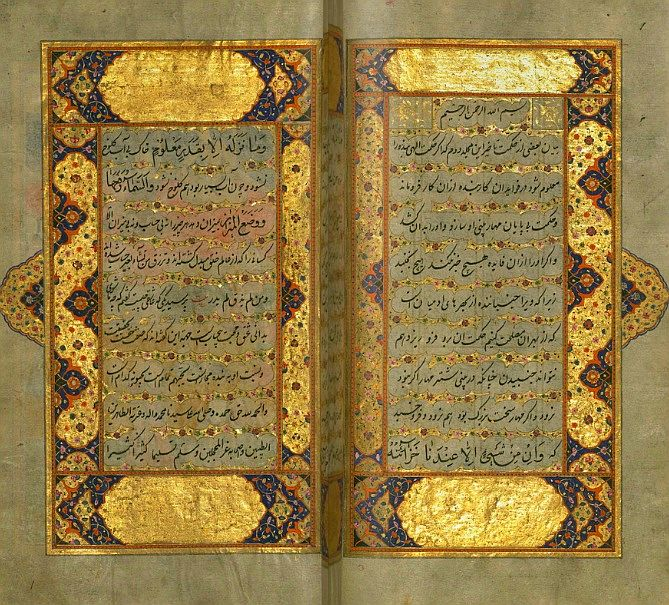 Manuscrito iluminado en escritura nastaliq (India 1663 e.c.) del masnavi "Masnavi ye Manavi" de Jalal ad-Din Rumi (1207-1273 e.c.)